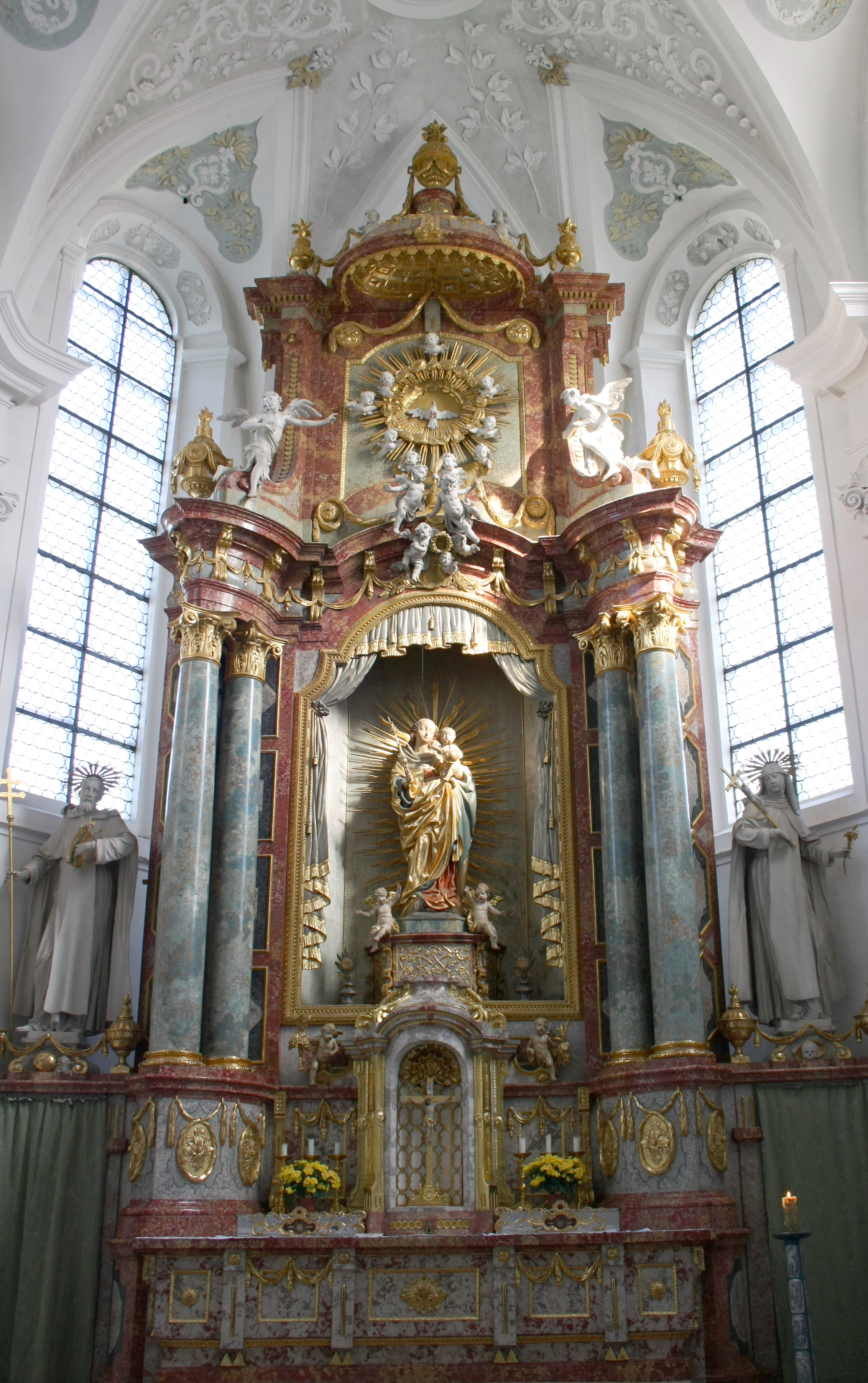 Klosterkirche Maria Medingen (Mariä Himmelfahrt) in Mödingen (Landkreis Dillingen an der Donau) des ehemaligen Dominikanerinnenklosters (Provinz Maria Medingen der Dillinger Franziskanerinnen), Chor und Hauptaltar mit spätgotischer Madonna (um 1460), links Skulptur des hl. Dominikus, rechts Skulptur der hl. Katharina von Siena